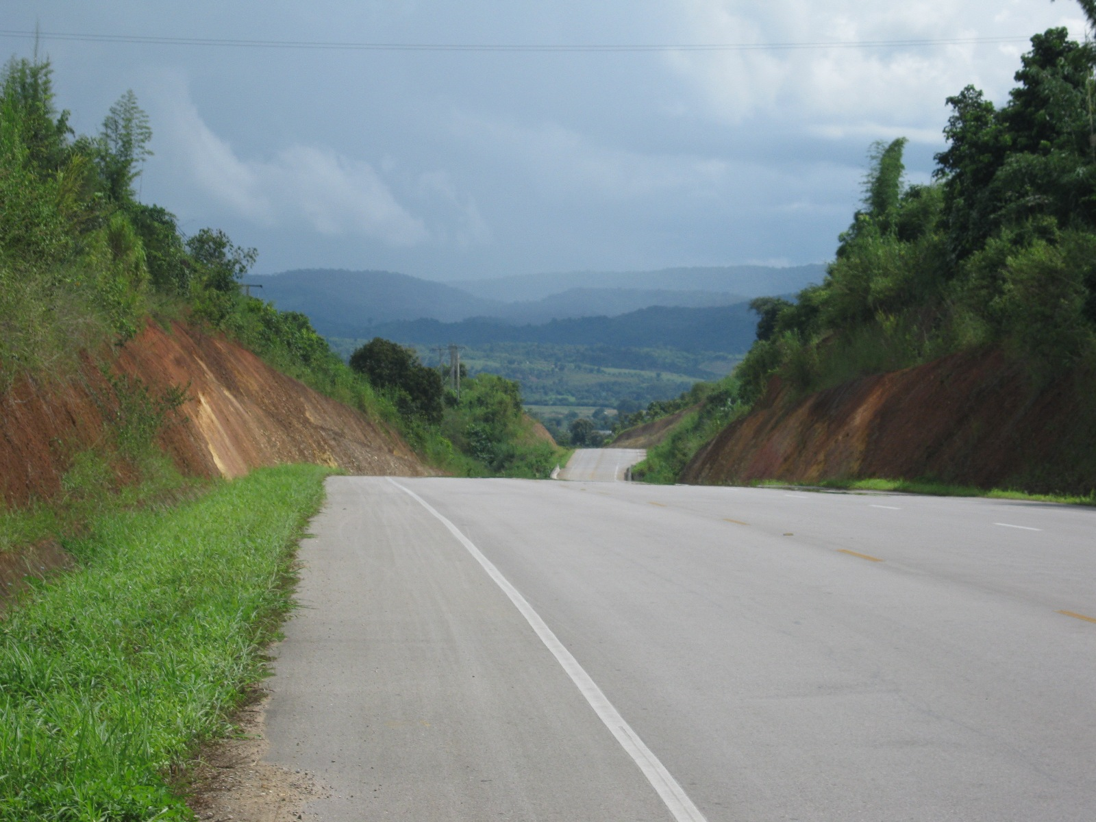 Chiang Dao, Thailand